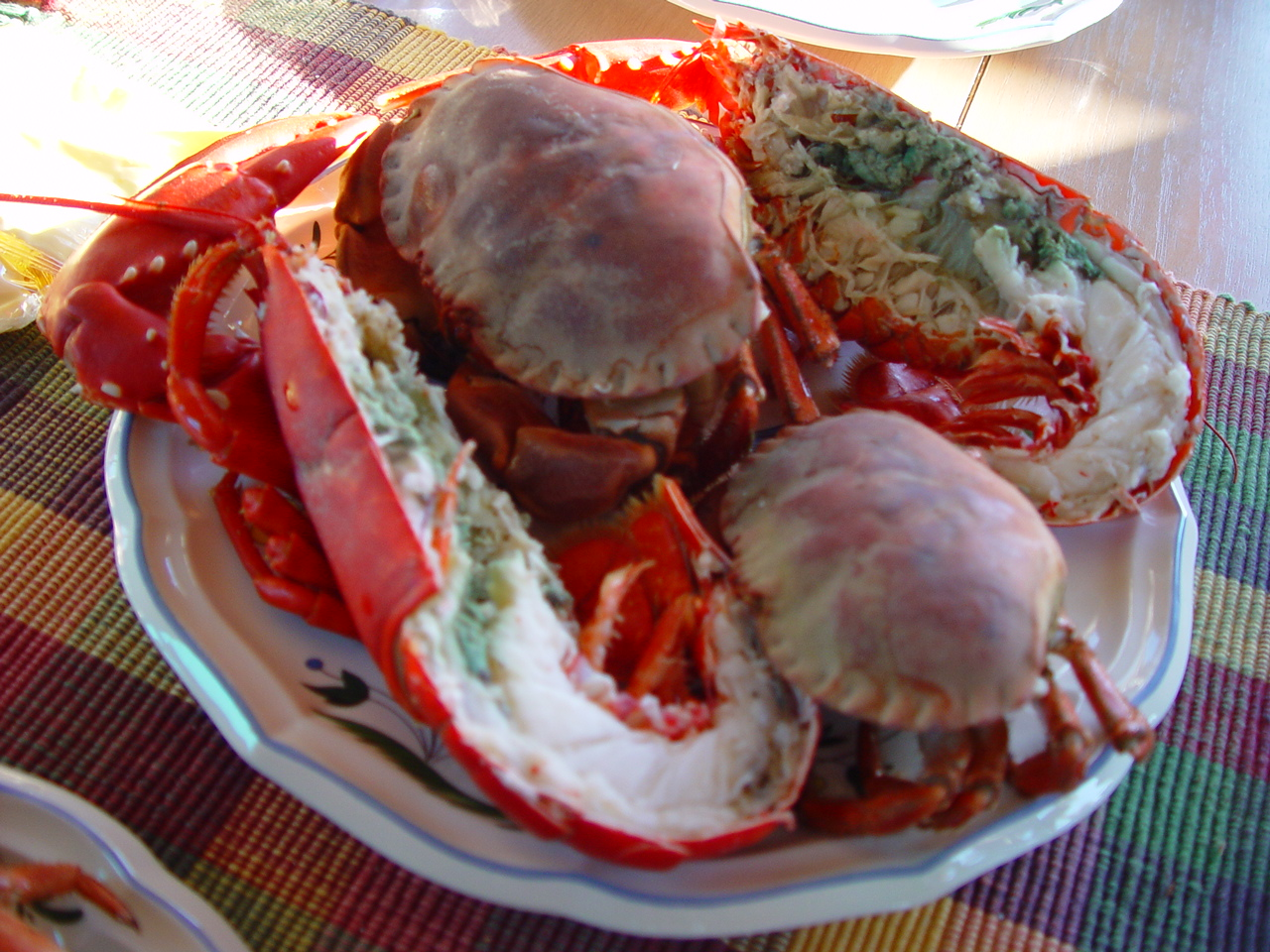 Kokte krabber og hummer